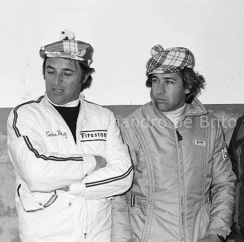 Néstor García Veiga y Carlos Pairetti, F1MA 1973.